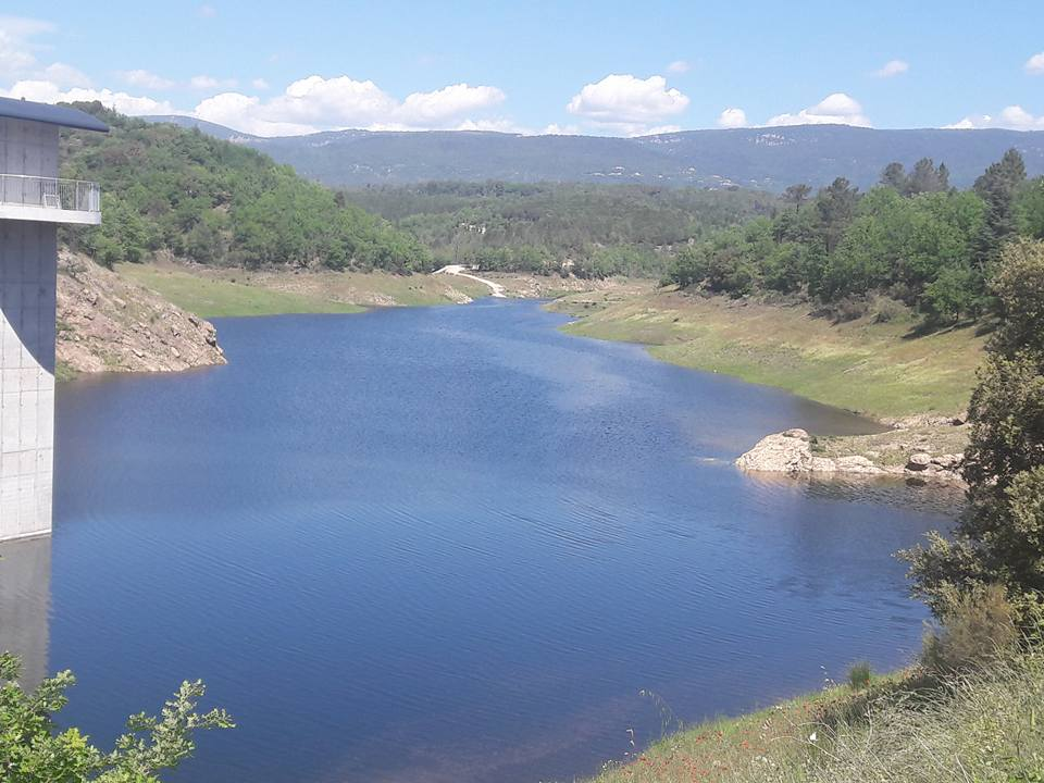 Lac de Meaulx vue du barrage